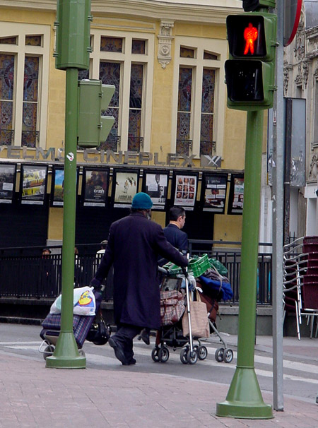 Persona sin hogar con síndrome de Diógenes, cruzando una calle de Madrid en enero de 2006.